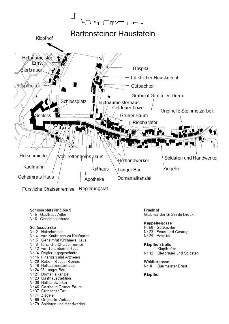 Plan von Bartenstein mit den Haustafeln. Sie geben einen Überblick über die hierarchische Besiedlung der Residenz im 18 Jahrhundert.